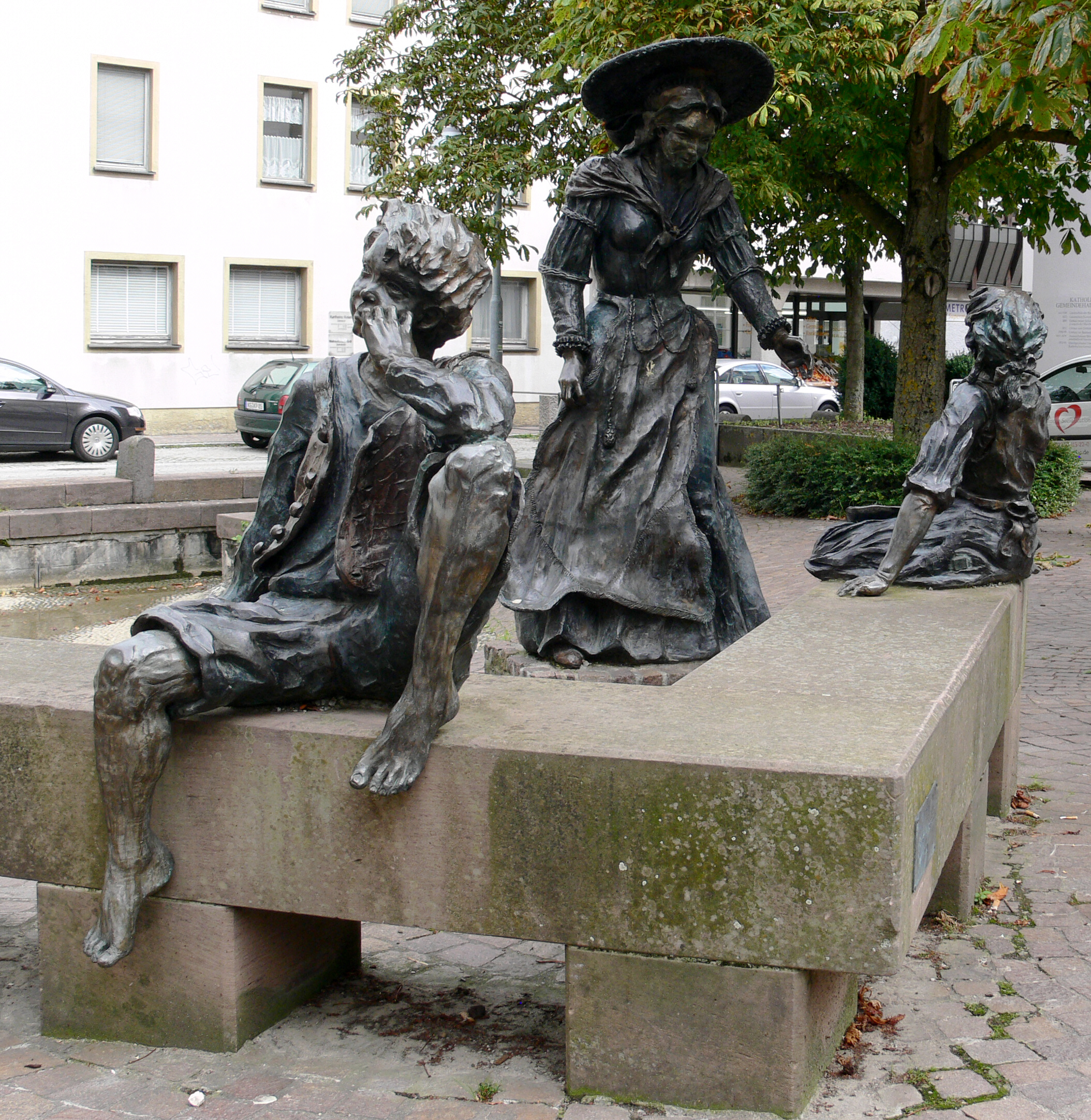 Biberach an der Riß Trachtengruppe hinter der Kirche St. Martin, von Danielle Bigata, 1994